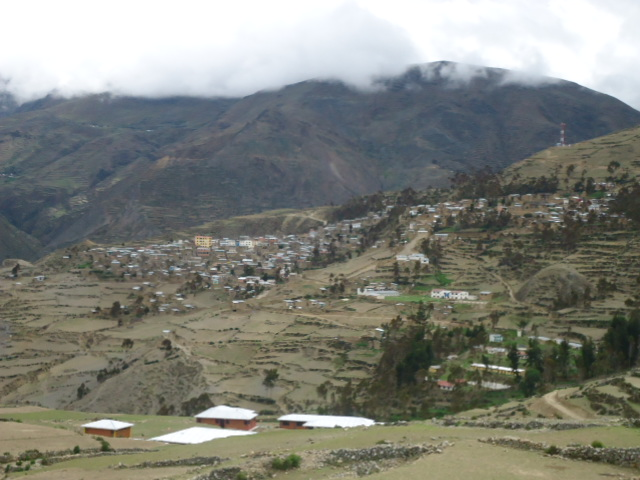 localidad amarete